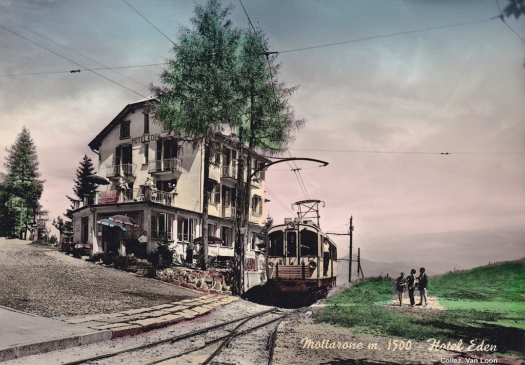 Ferrovia Stresa-Mottarone, il transito a fianco dell'Hotel Eden.